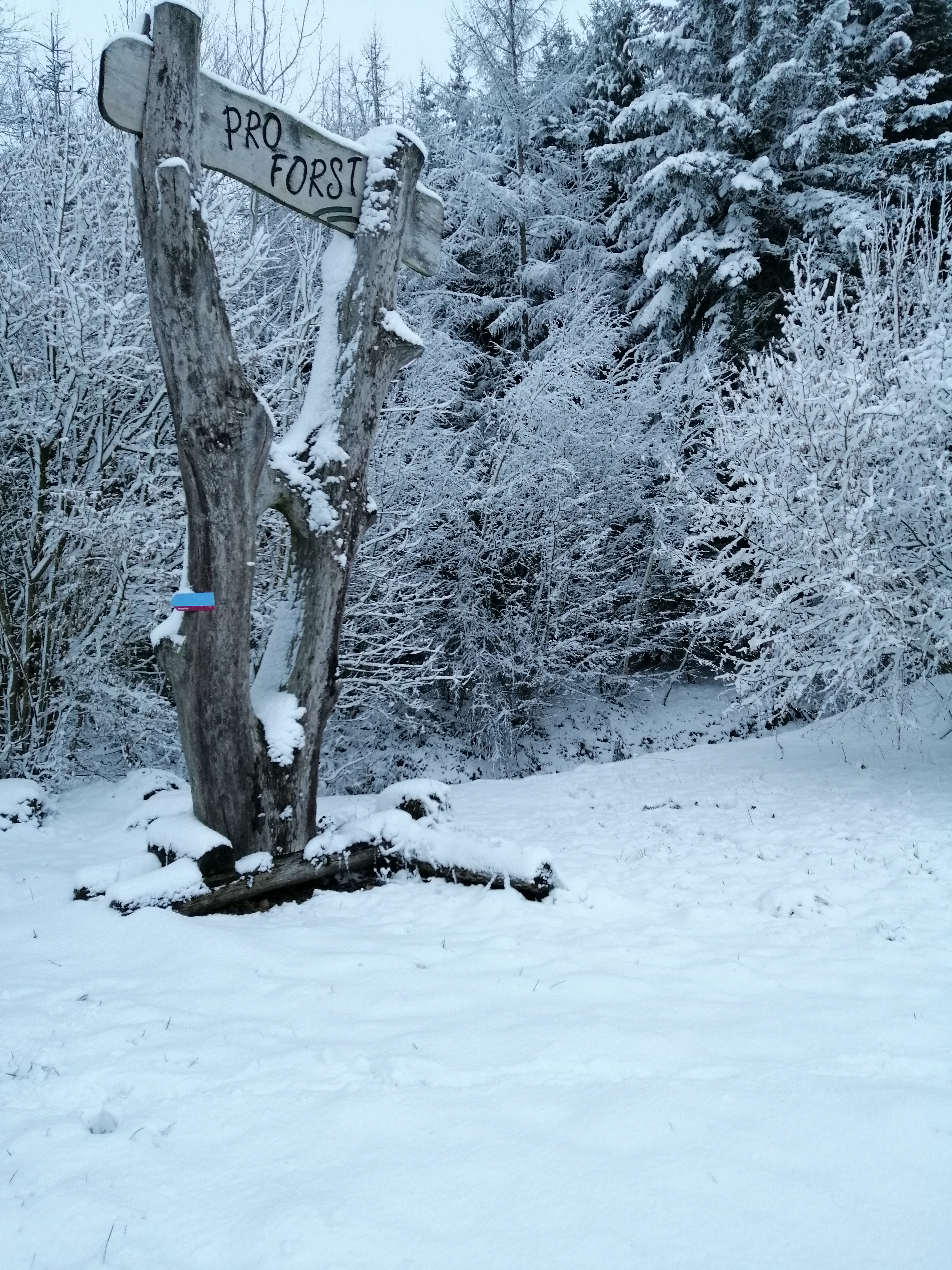 Pro Forst Schild am Beginn des Wanderwegs zu den Weihern